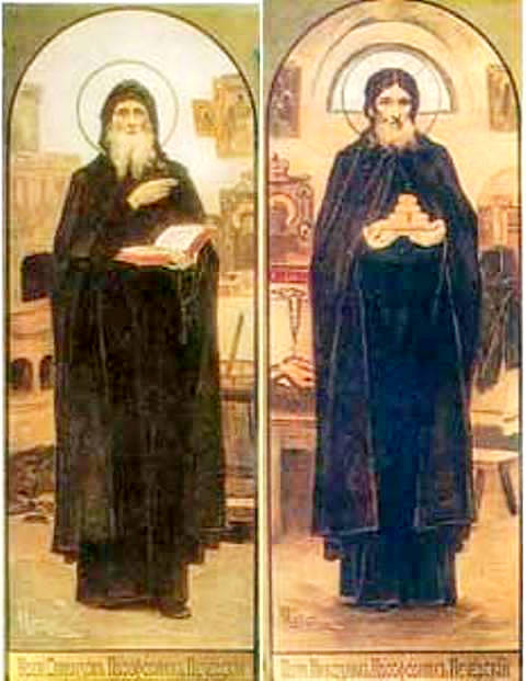 Преподобные Спиридон и Никодим, просфорники Печерские.